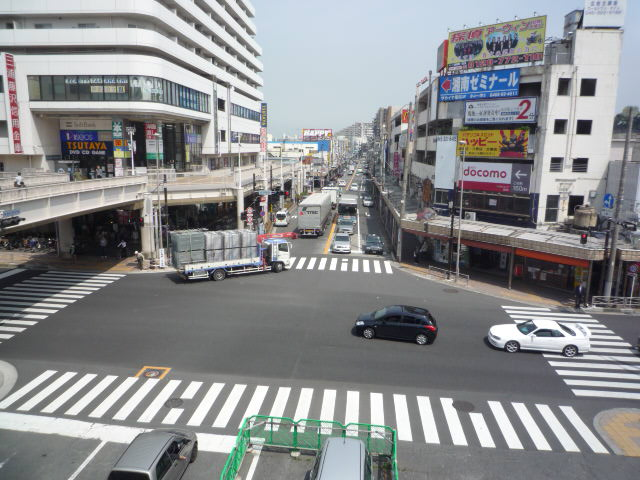 追浜商店街入口